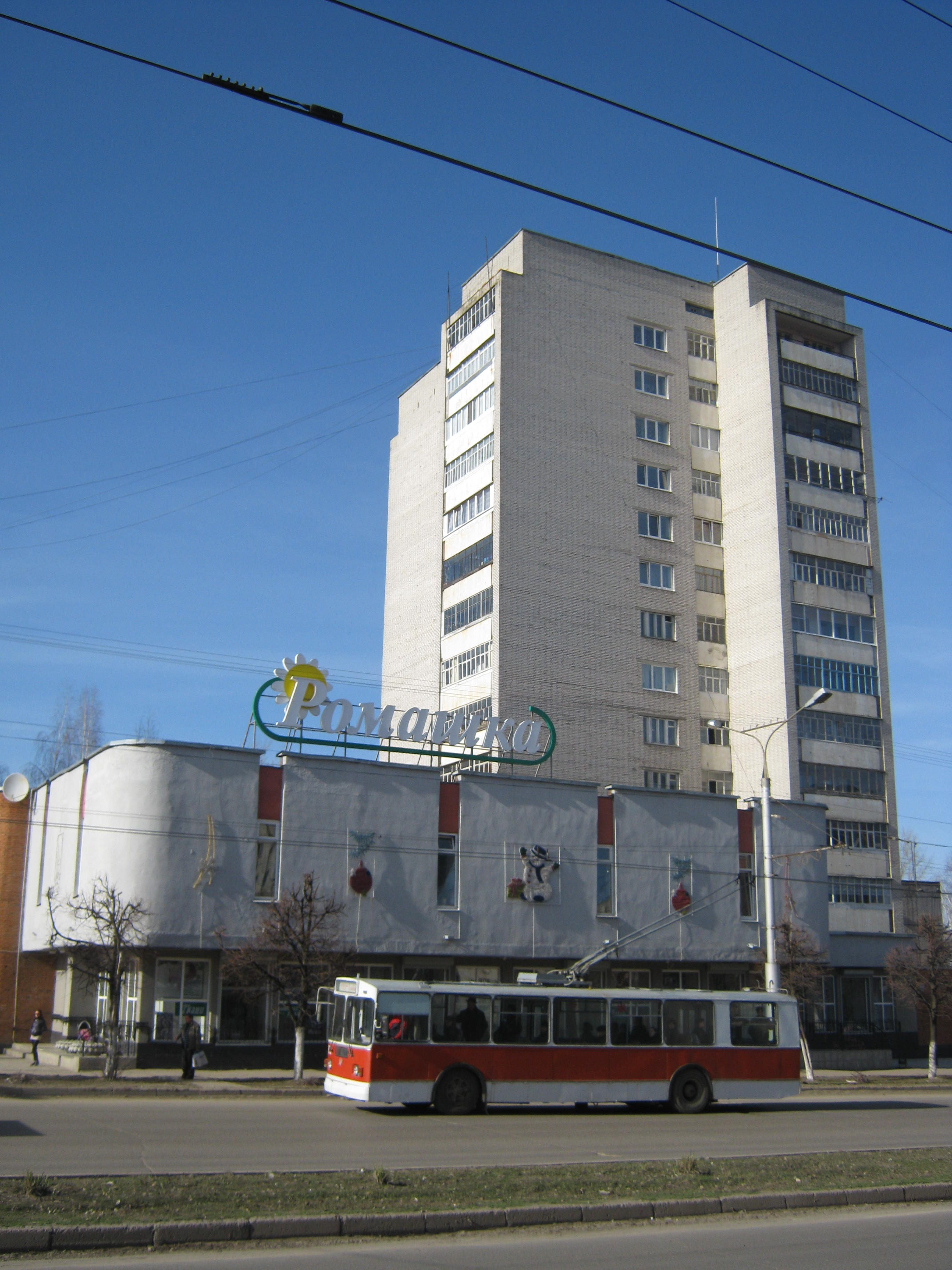 Троллейбус на проспекте 9-й Пятилетки (г. Чебоксары).